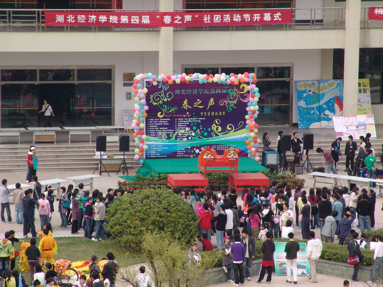 湖北经济学院社团活动春之声开幕式